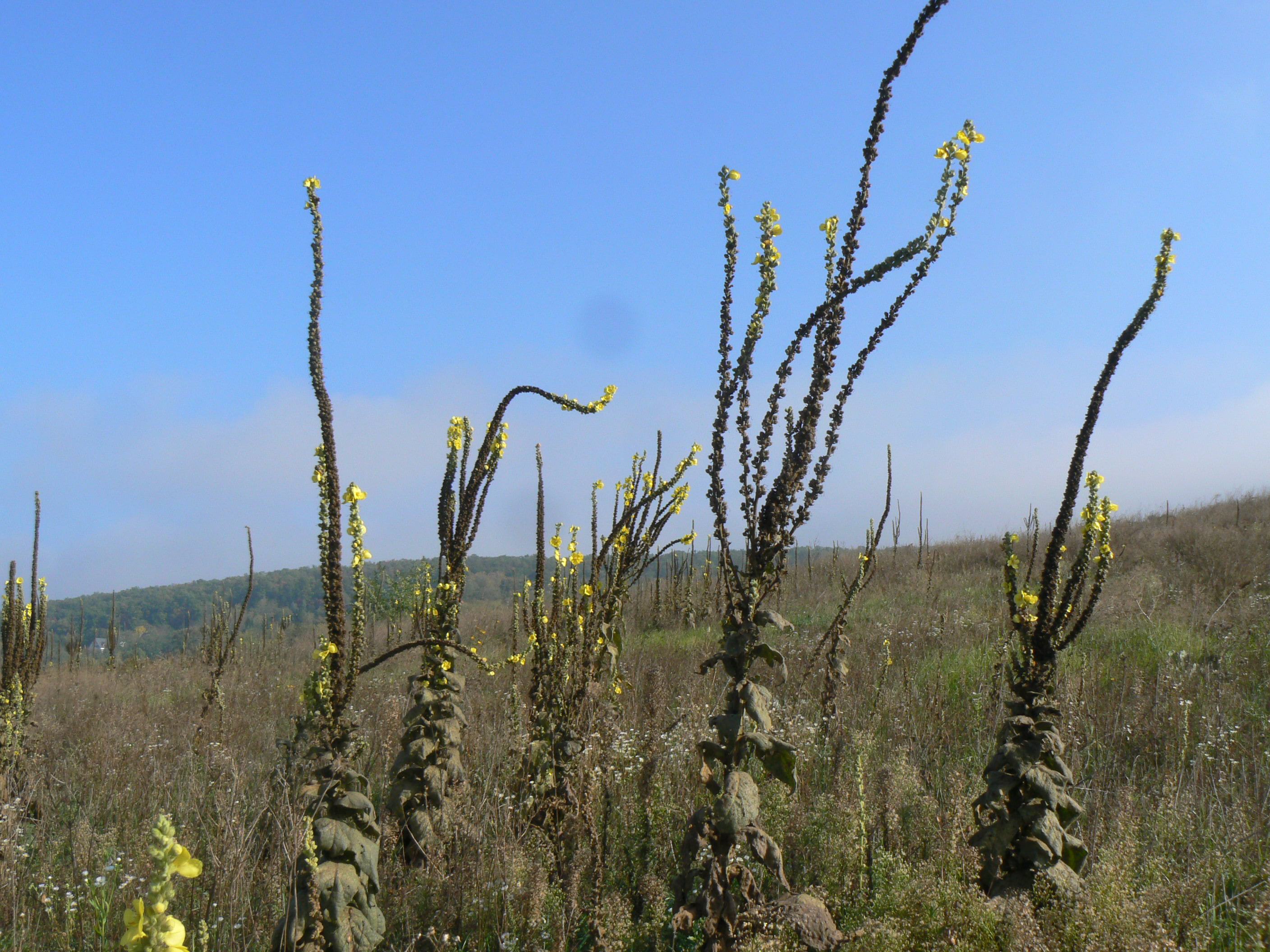 Szöszös ökörfarkkóró Piliscsabánál